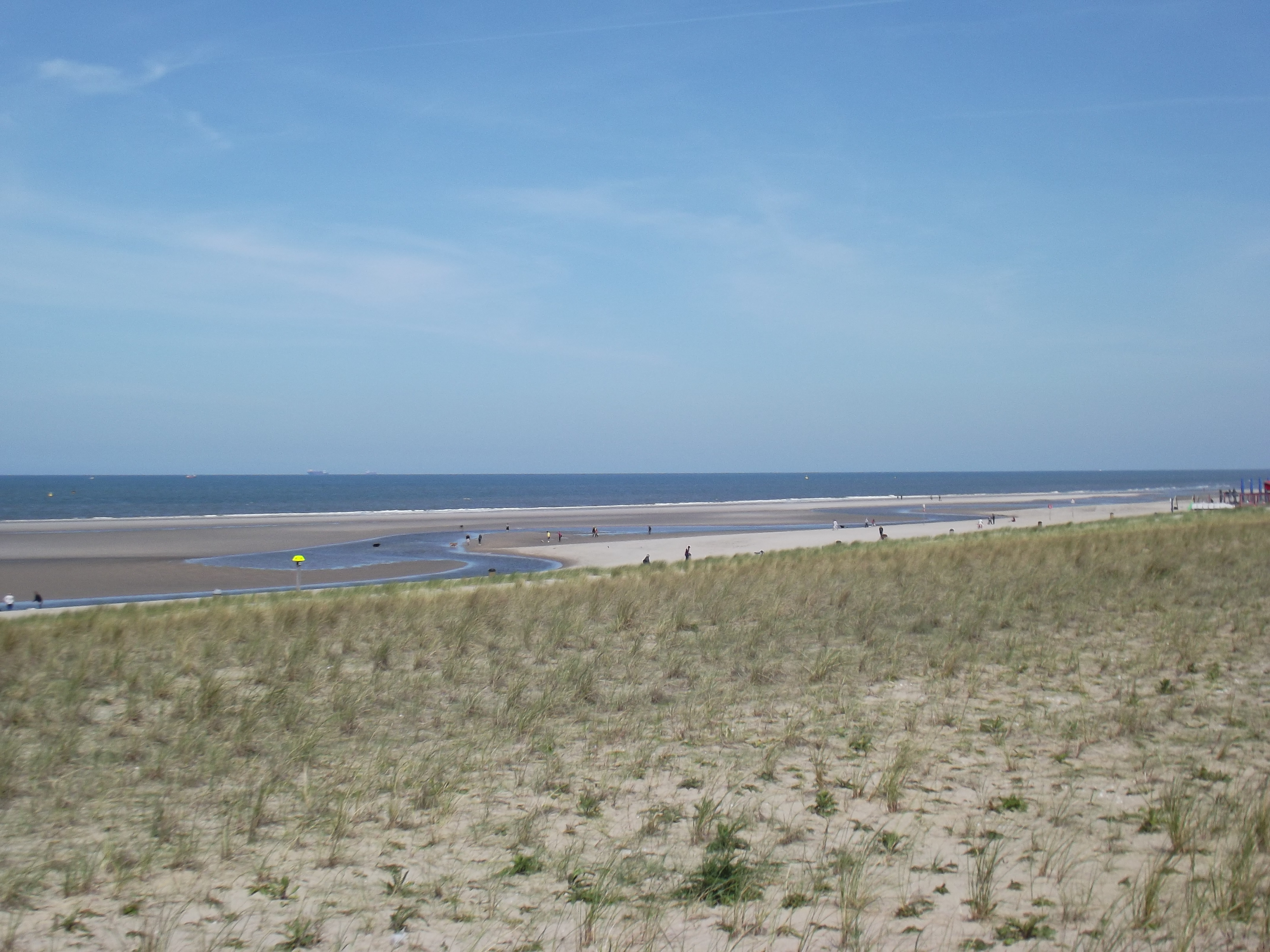 Zandmotor geul die tot voorbij de strandopgang 2A gaat in mei 2014